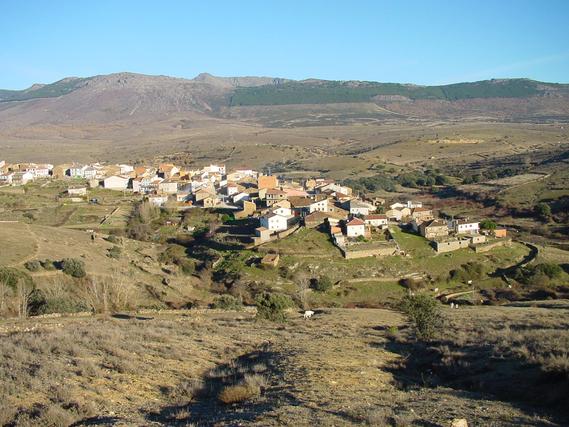 Vista aérea de Paredes de Buitrago.